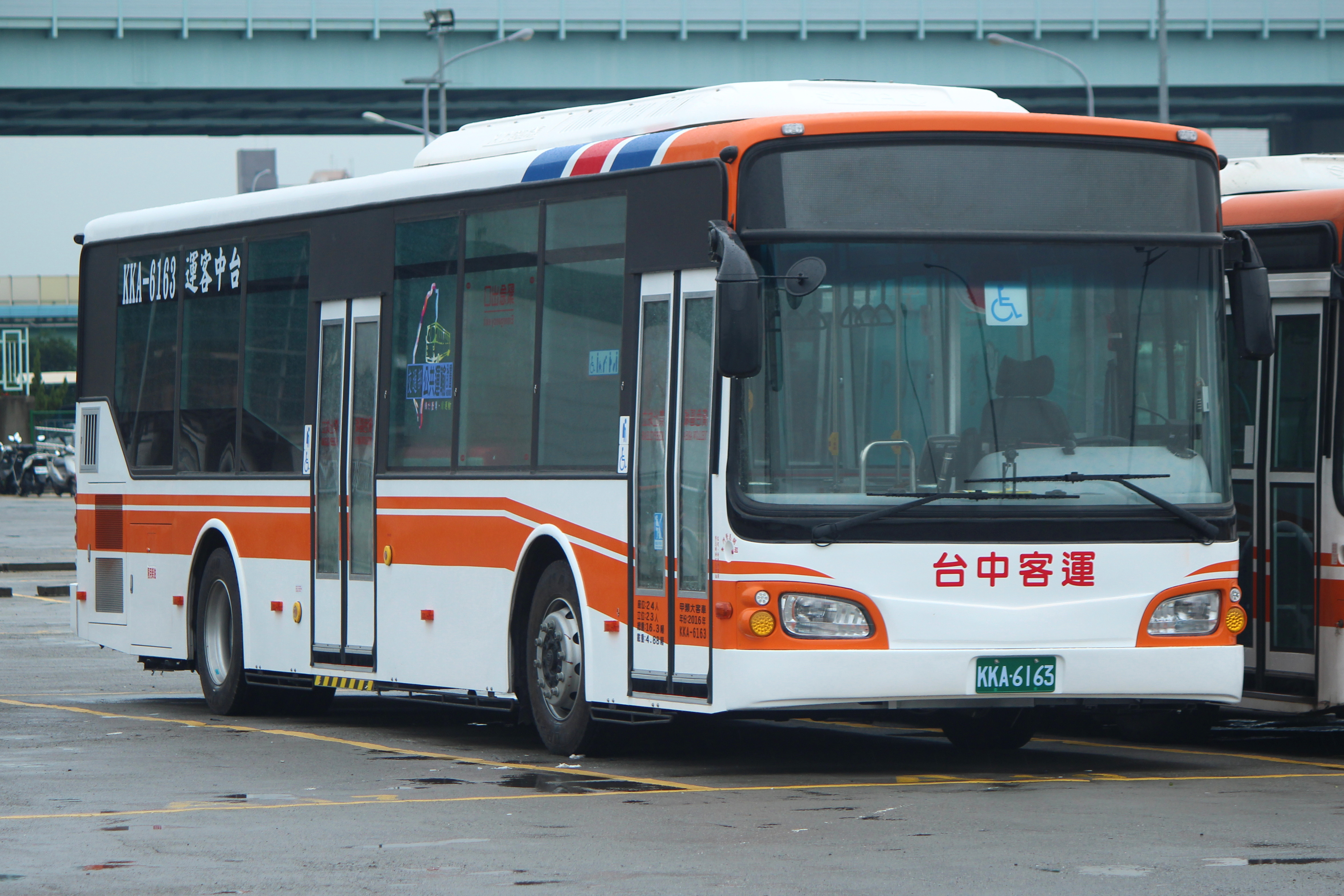 中文（台灣）: 台中客運2016年日野HS8JRVL-UTF大客車KKA-6163。